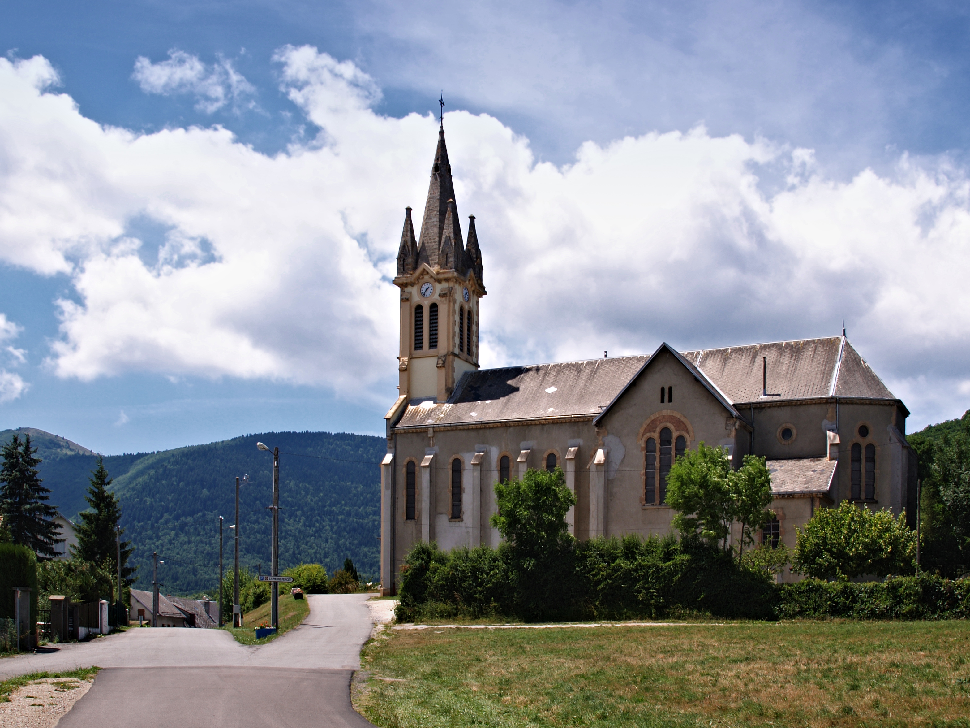 Pierre-Châtel (Isère) - Église Saint-Pierre